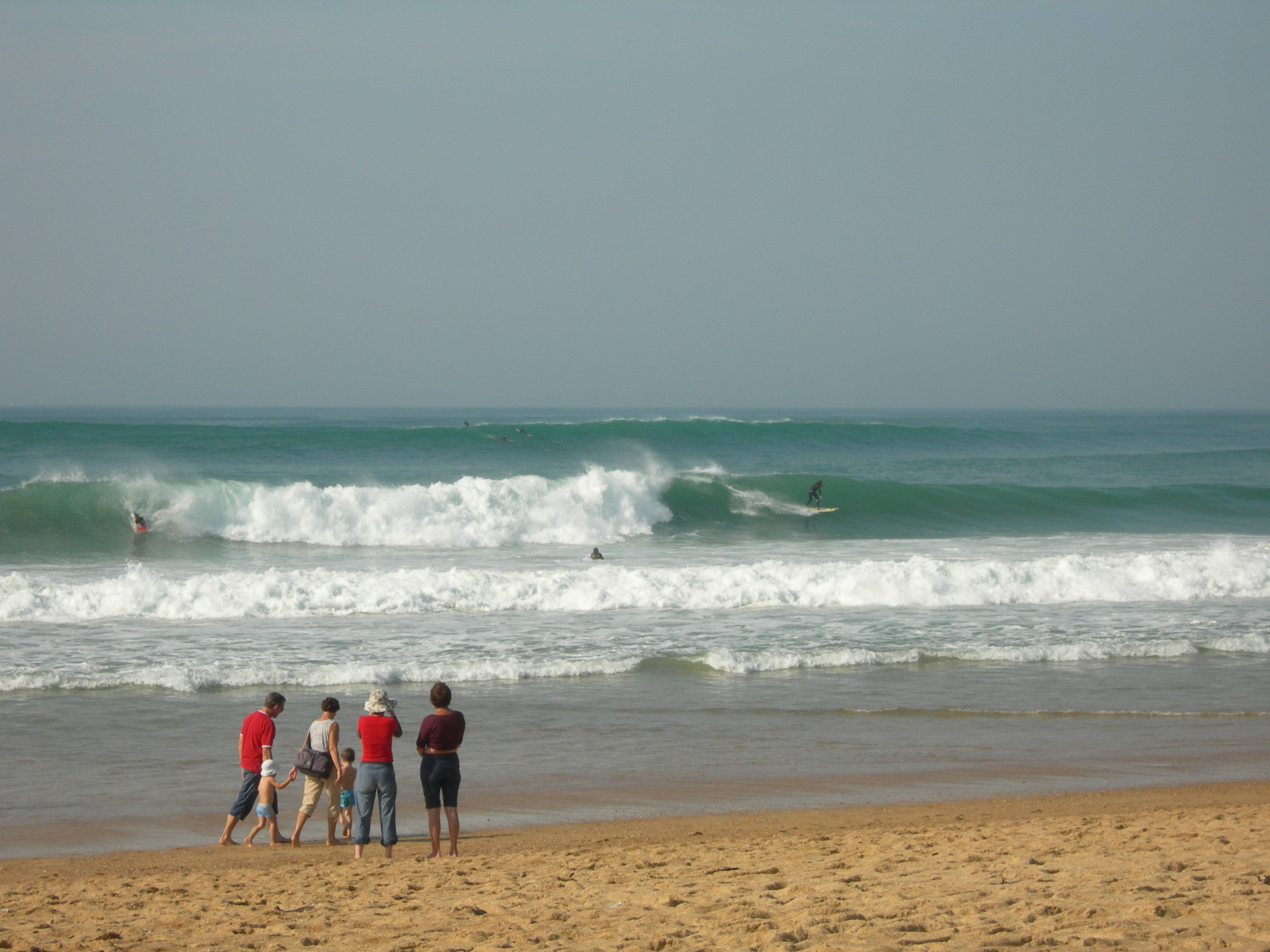 Surfeurs à Soorts-Hossegor (France)